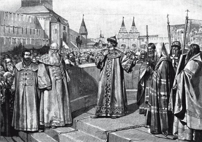 Это рисунок русского художника Клавдия Лебедева «Царь Иоанн IV открывает первый Земский собор своею покаянною речью». На картине открытие Первого Земского Собора 1549 года.